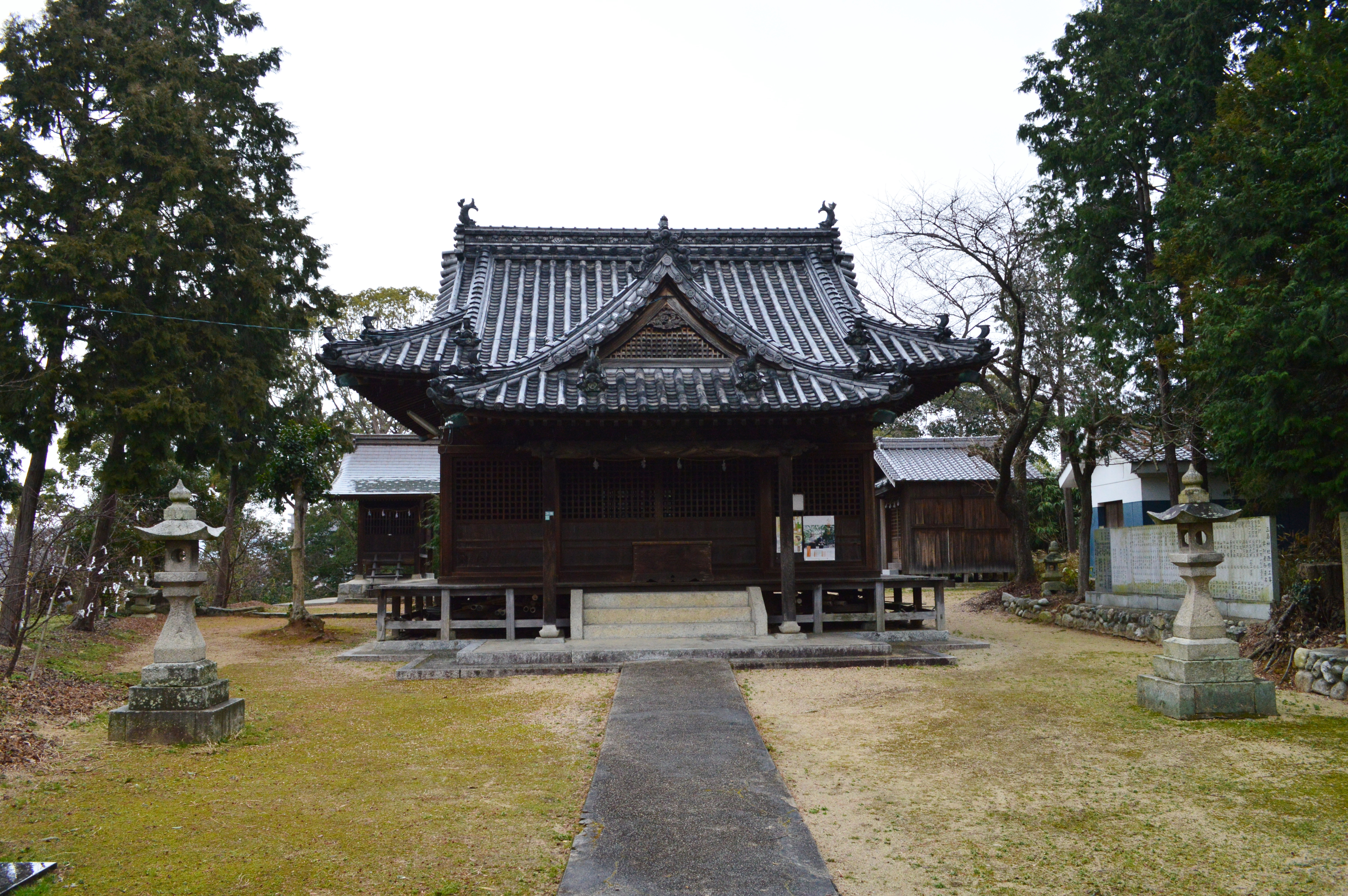 鯨山古墳 墳頂の三島神社